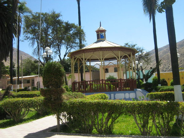 Foto de la plaza del pueblo de Omas-Yauyos-Lima-Perú.